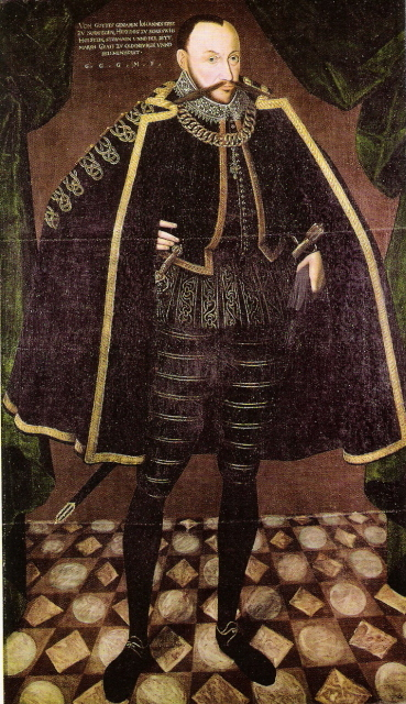 John II, Duke of Schleswig-Holstein-Sonderburg (1545-1622)